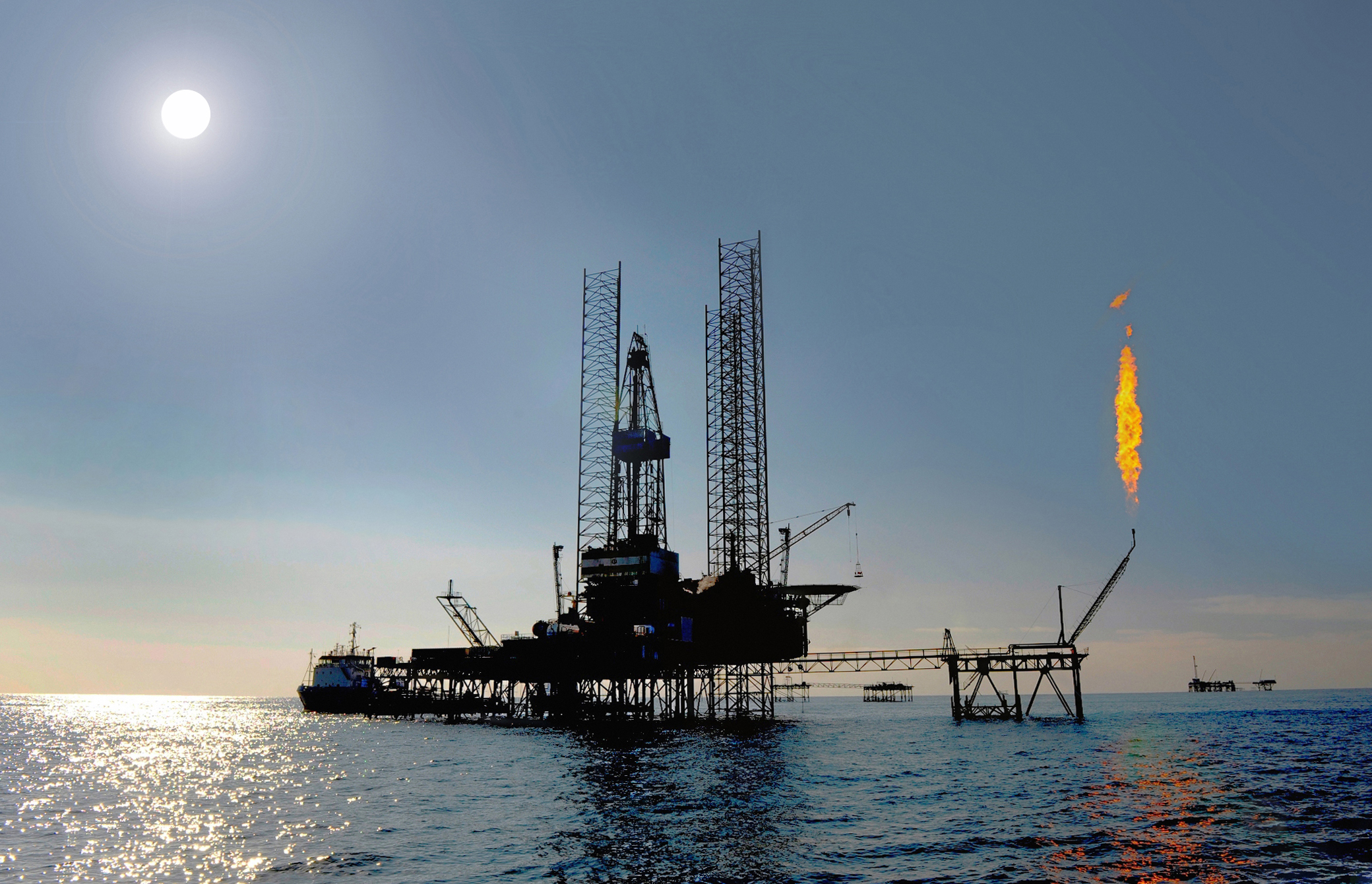 Bohrplattform "Iran Khazar" im Einsatz an einer Förderplattform von Dragon Oil im Cheleken-Feld (Turkmenistan).